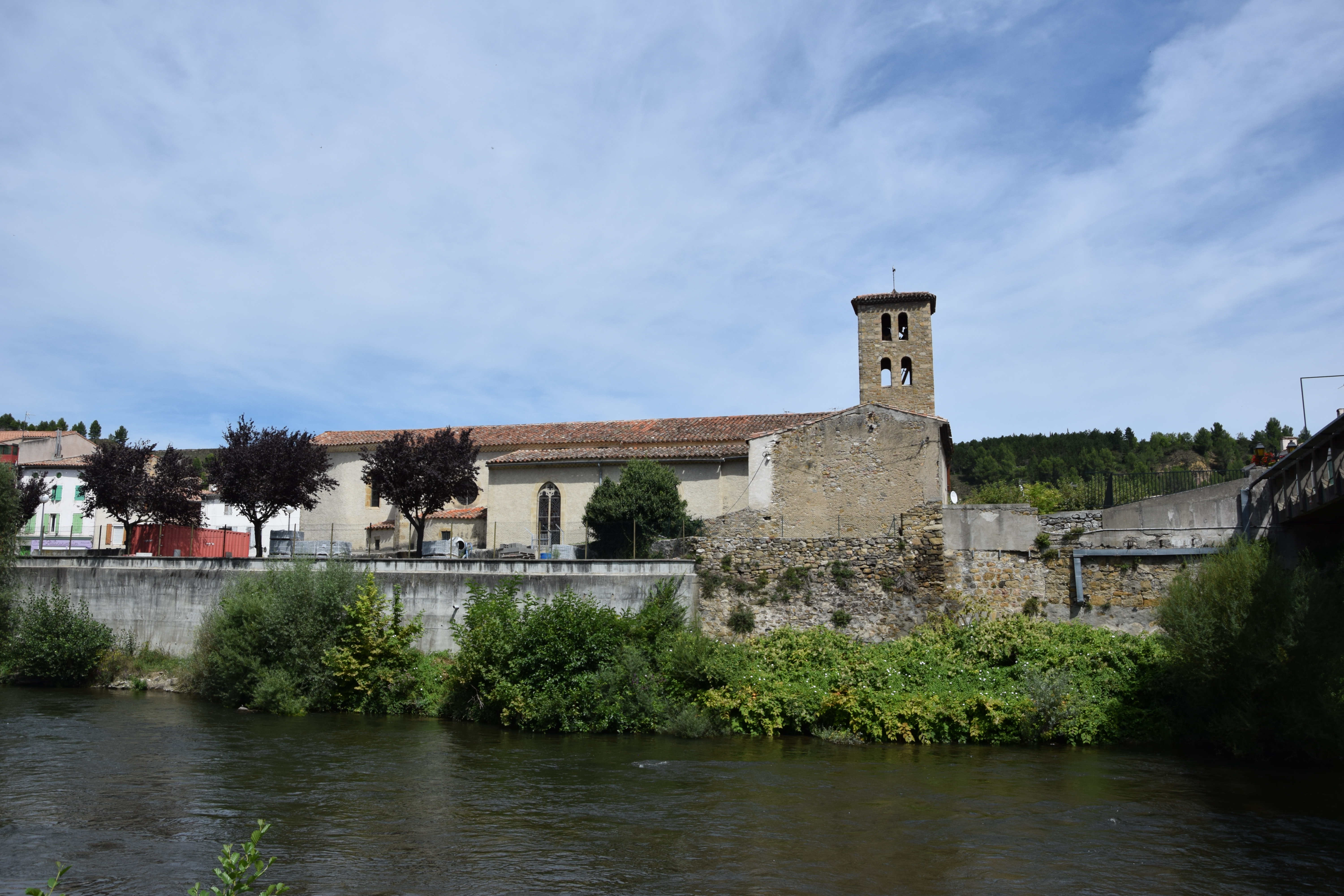 Église Saint-Michel à Espéraza